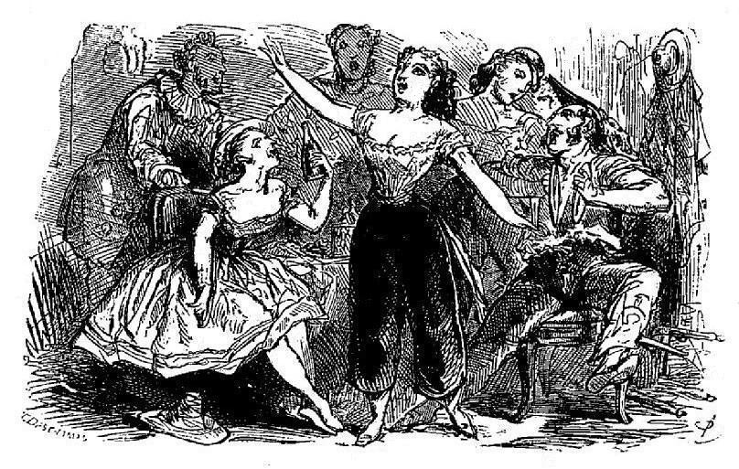 Parisiens en Carnaval, illustration pour l'Almanach de la jeune chanson française 1867 (paru fin 1866).